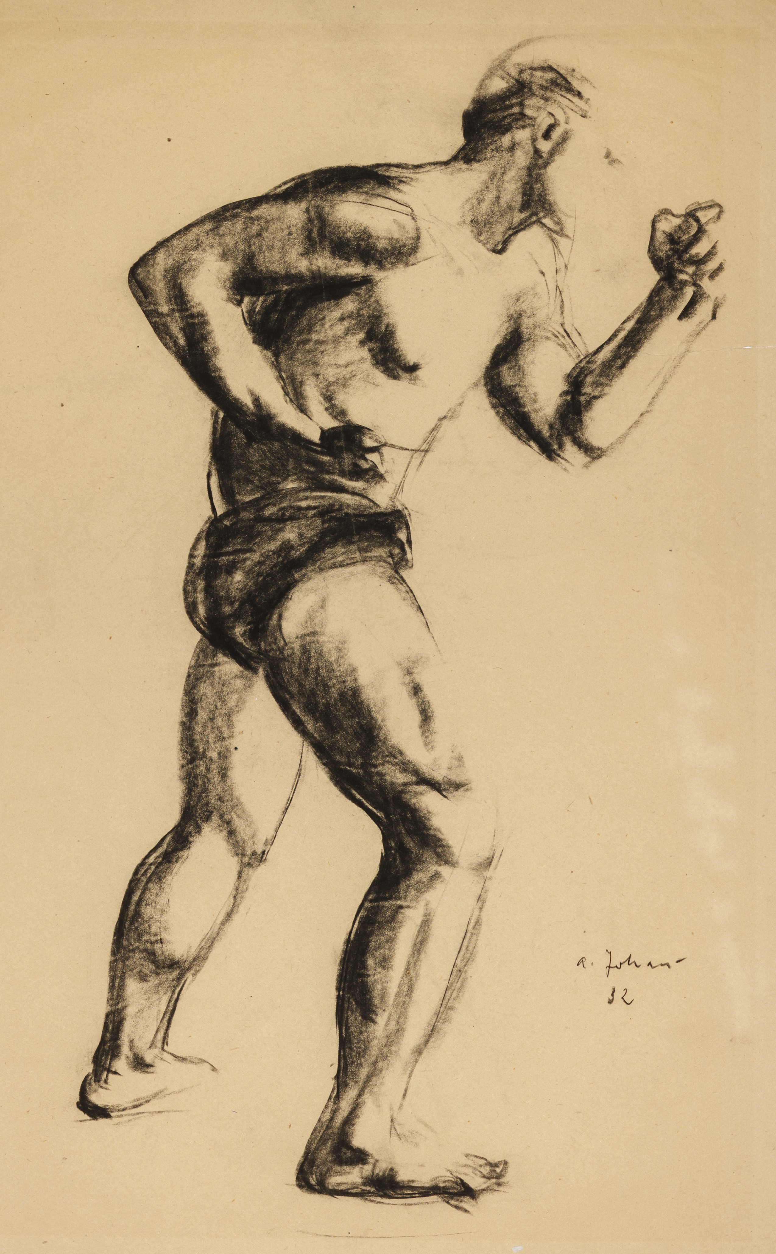 "Poksija" (1932), süsi paberil. Lehe kõrgus 61,4 cm ja laius 47,1 cm. MUIS:TKM TR 5008 B 1599